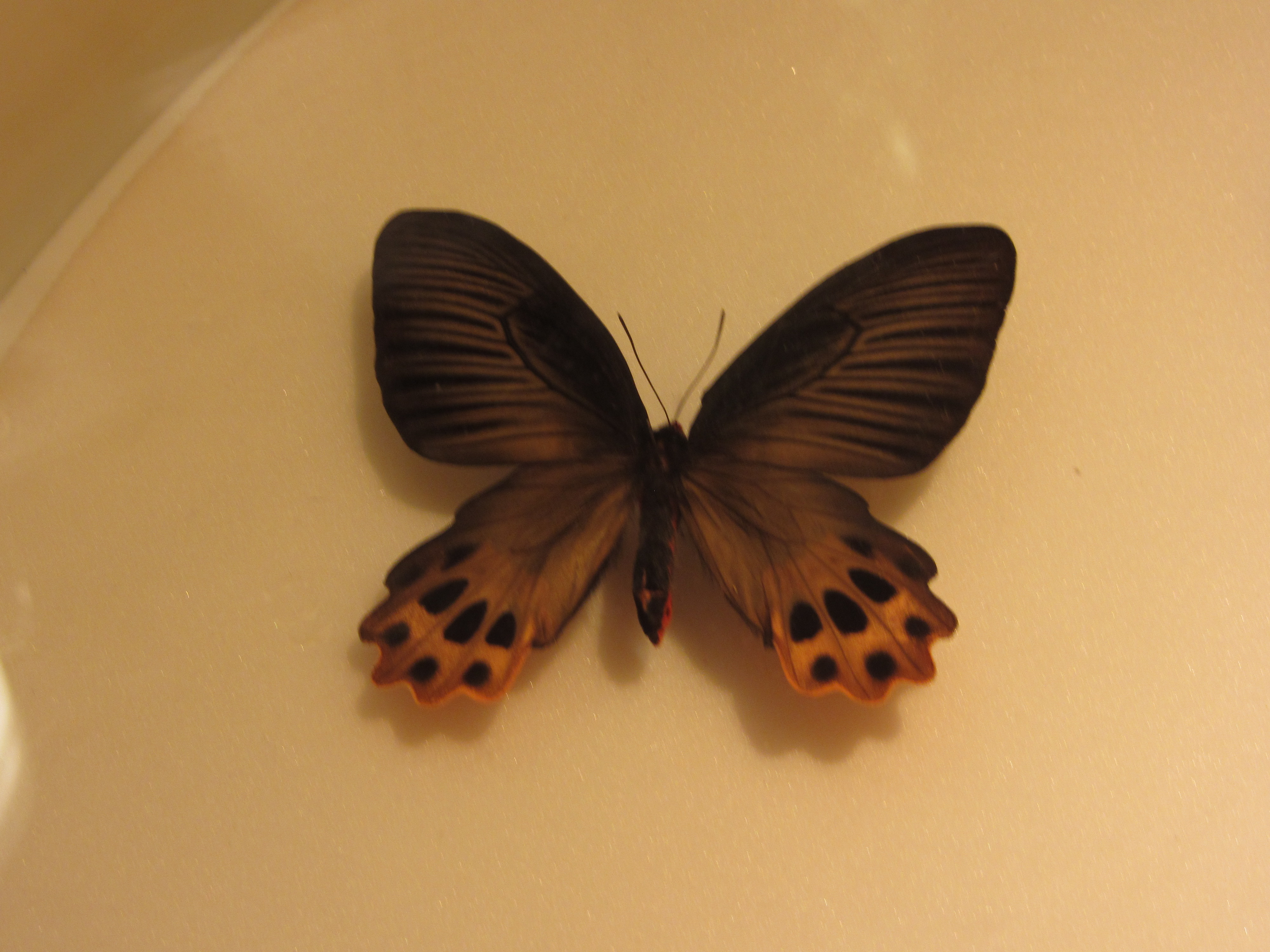 雌性曙鳳蝶標本